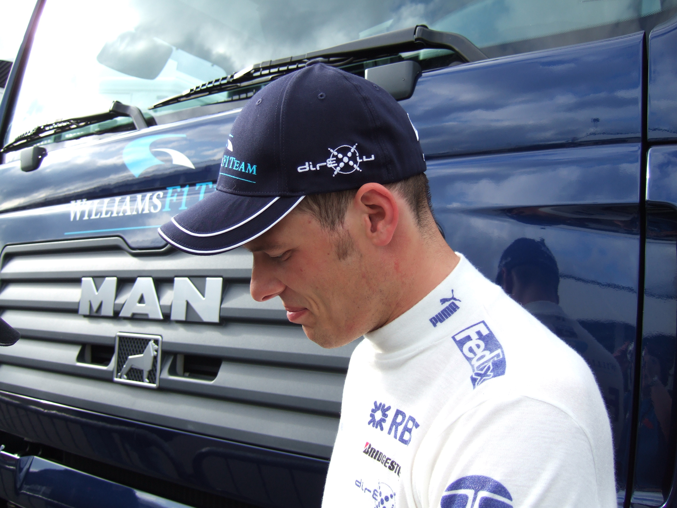 Alex Wurz at Silverstone in 2006.